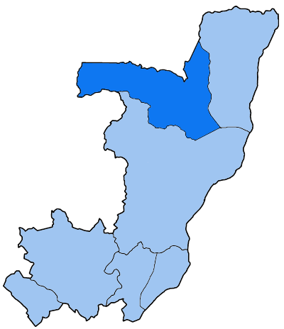 Mappa della diocesi cattolica di Ouesso, nella Repubblica del Congo.